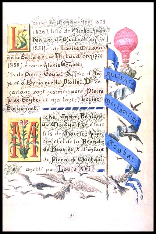 Alexis Goybet (1786-1854) est négociant à Lyon, puis à Paris. Il est le fils de Pierre Goybet et d'Emmanuelle Piollet. Il épouse Louise Marie Jeanne de Montgolfier (1805-1826) le 18 juin 1822, la petite nièce des inventeurs Joseph et Étienne de Montgolfier comme son cousin Marc Seguin. Louise de Montgolfier est la grand mère du Général Mariano Goybet, qui est l'arrière Grand père d'Henri Goybet, auteur de cette photo.